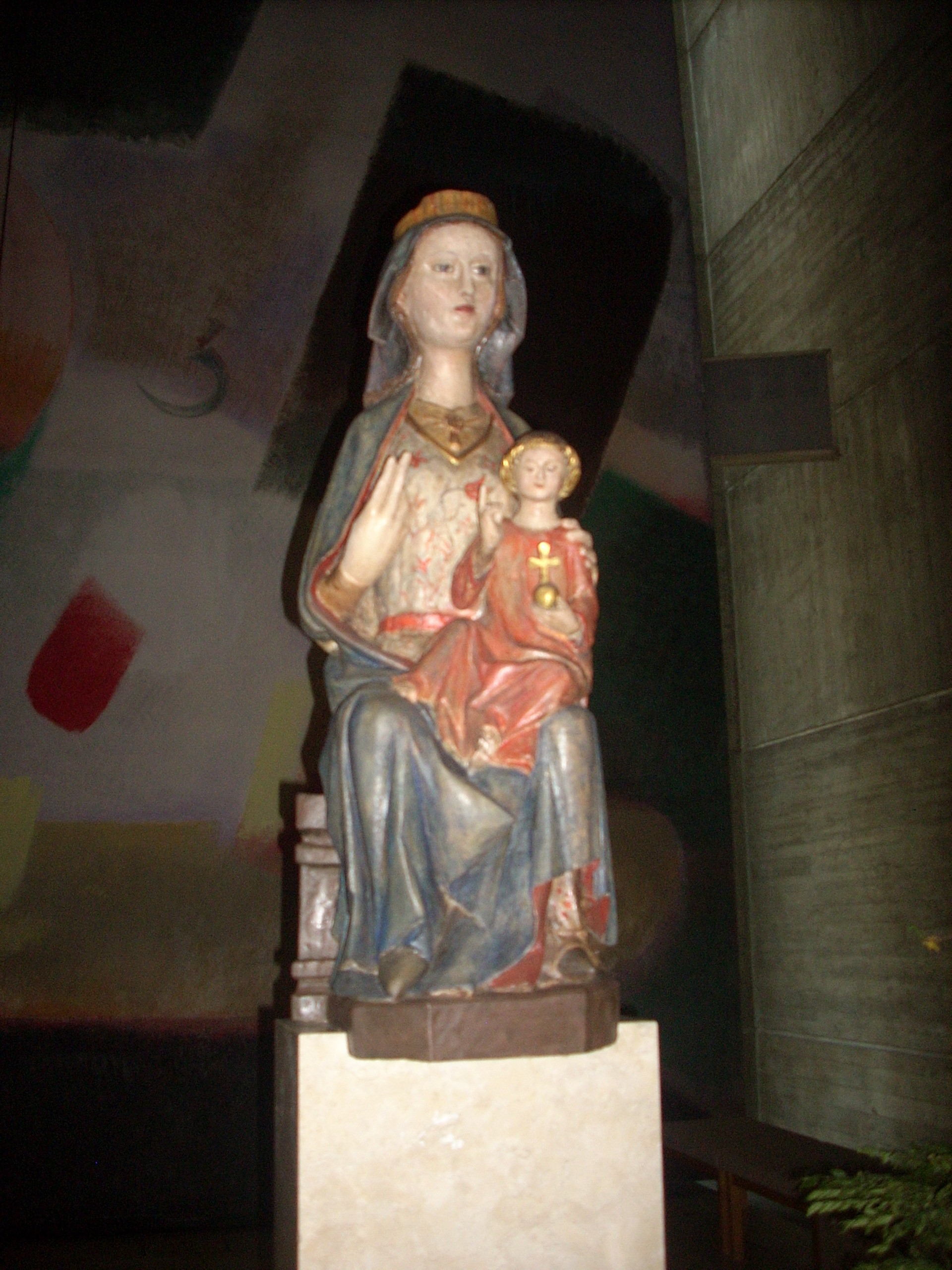 Berlin, katholische Kirche Maria Regina Martyrum, gotische Madonna in der Oberkirche